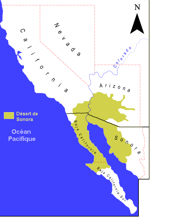 Carte de localisation du désert de Sonora (États-Unis / Mexique) Source : Pilt:Sonora2.gif, Siim Sepp, 2004 Modifiée par l'utilisateur Urban, avec Paint, 2005